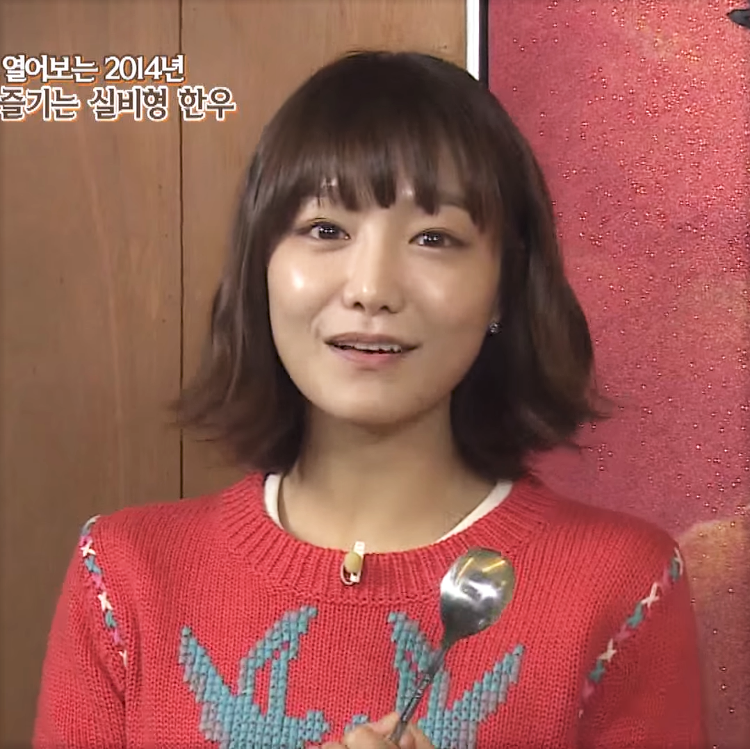 신소율, 손은서 출연 "실비형 한우" 영등포구 문래동 맛집 "값진 식육" [식신로드 Gourmet Road] EP 163-1